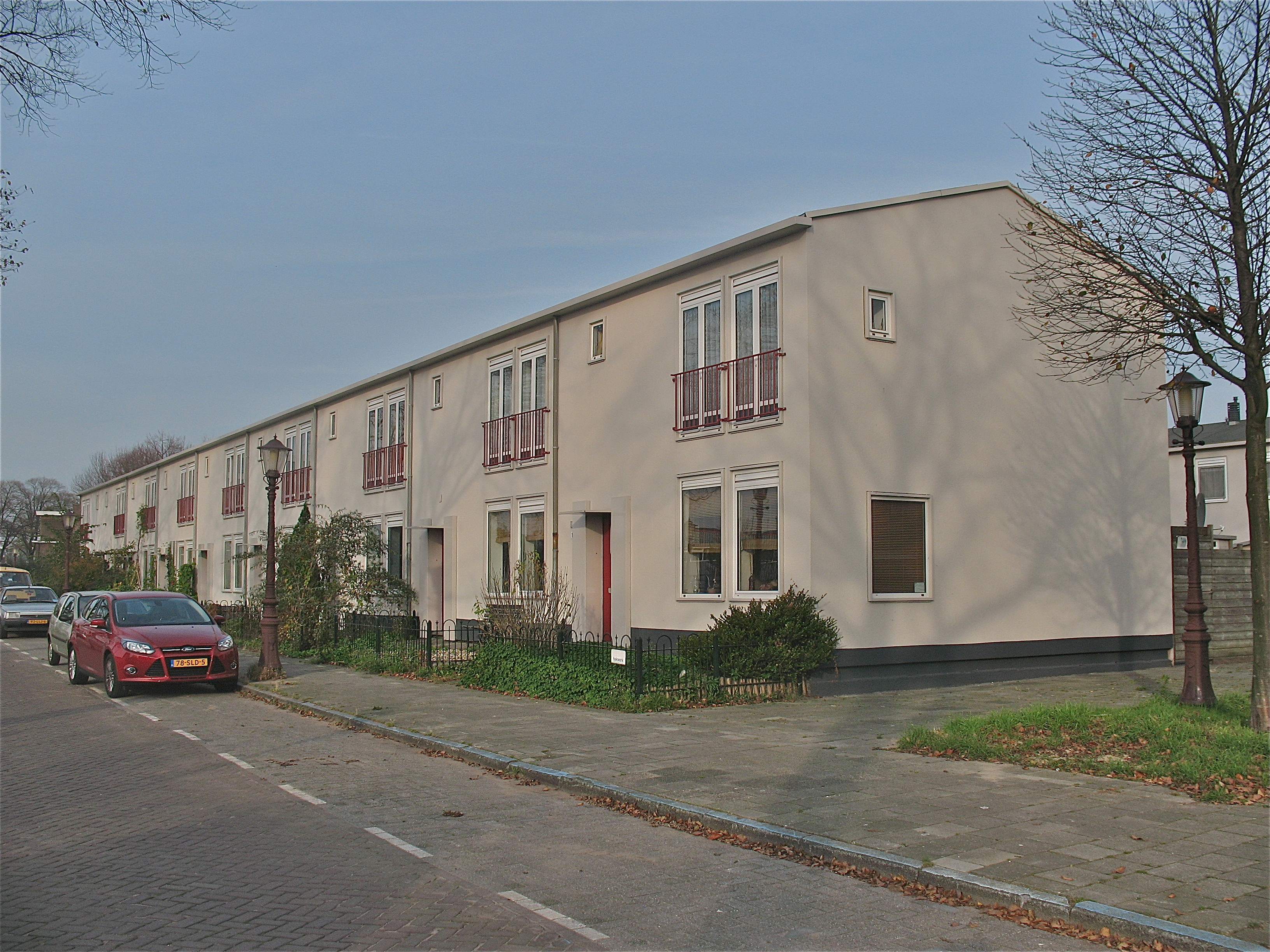 Woningen in de polder Buiksloterham, Amsterdam-Noord. Van der Pekbuurt, Ranonkelkade